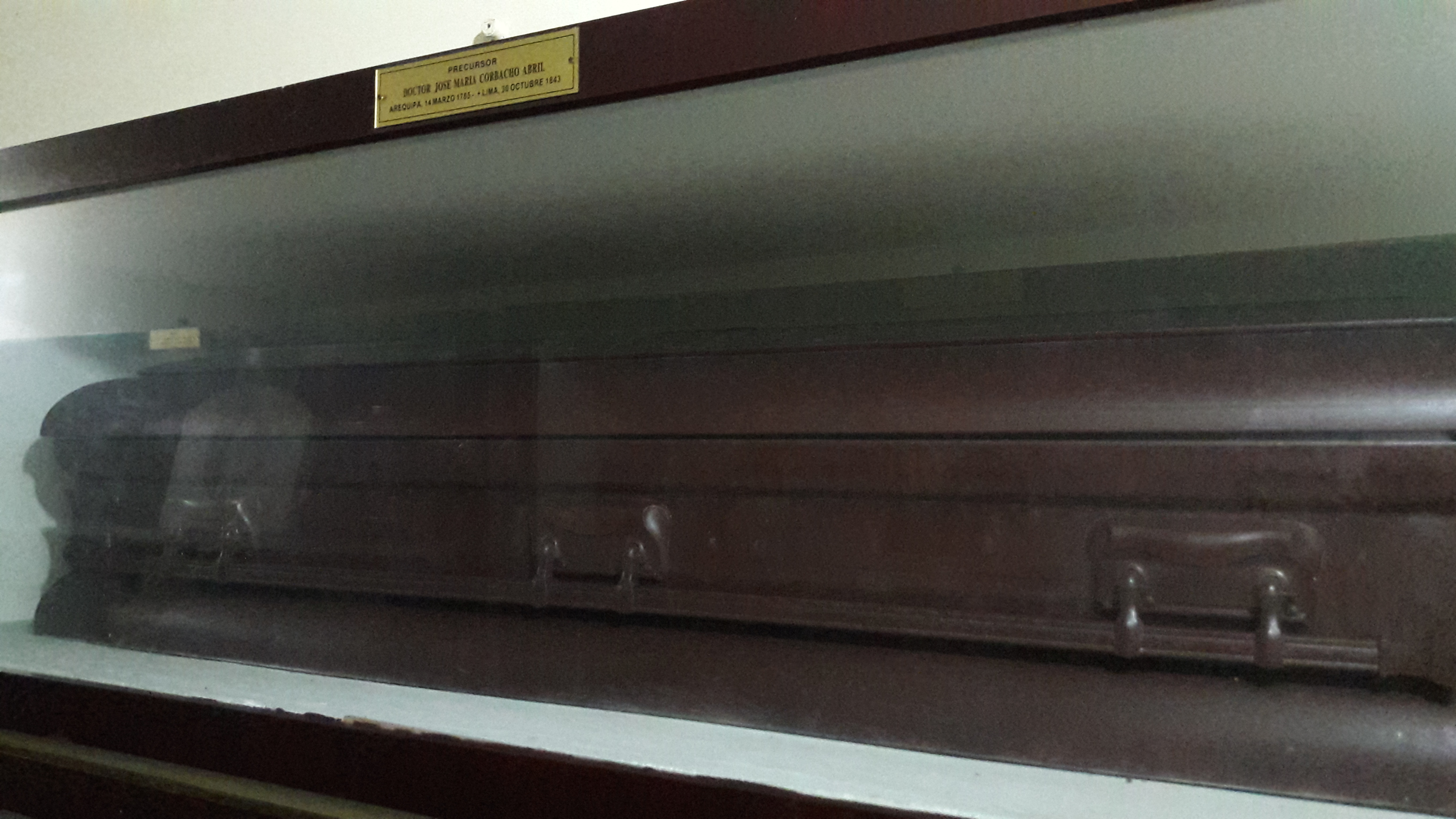 Tumba de José María Corbacho y Abril